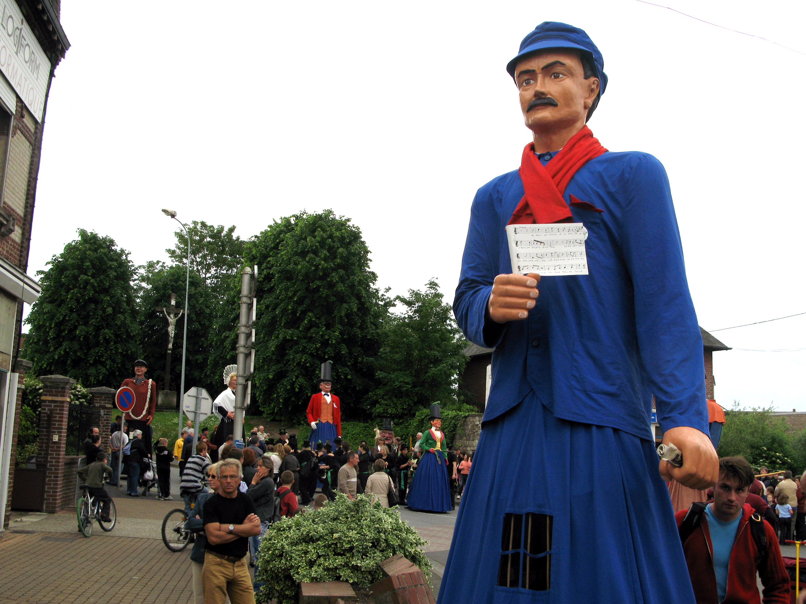 Ham (Somme, France) - Animation festive au centre-ville, un dimanche de printemps. Le géant Pierre de Geyter, après avoir descendu la rue du Château, rejoint la rue de Noyon. .